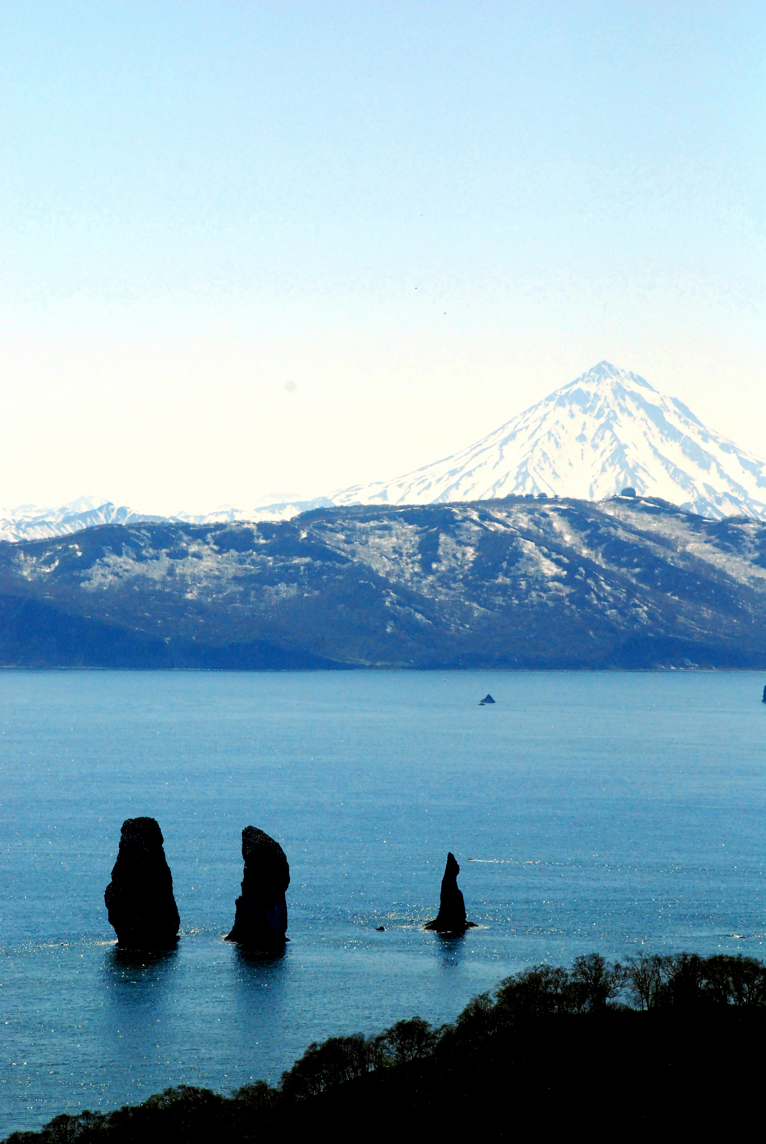 skały Trzej Bracia w Zatoce Awaczyńskiej, w tle Wulkan Wiluczyński